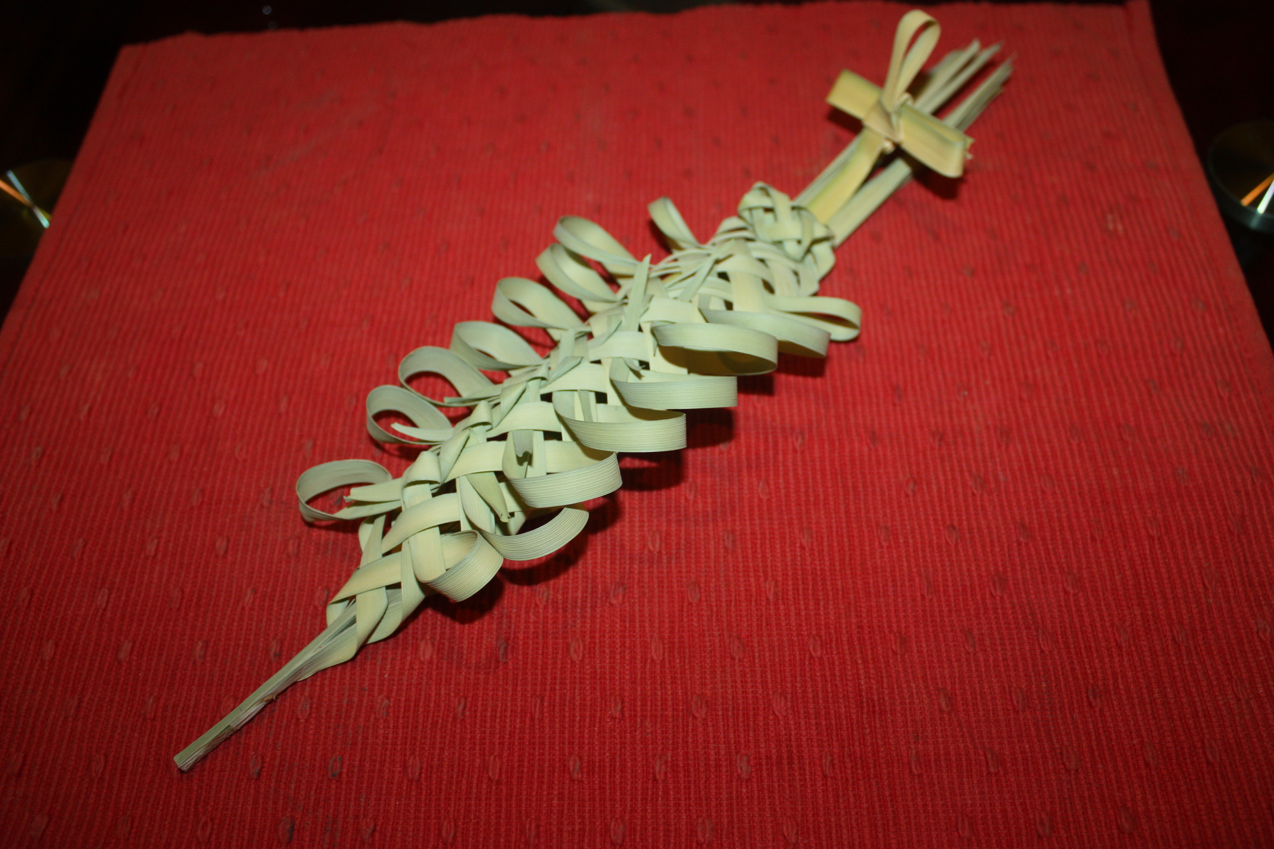 Dubrovačka poma (mlada uskrsna pletena palmina grančica)